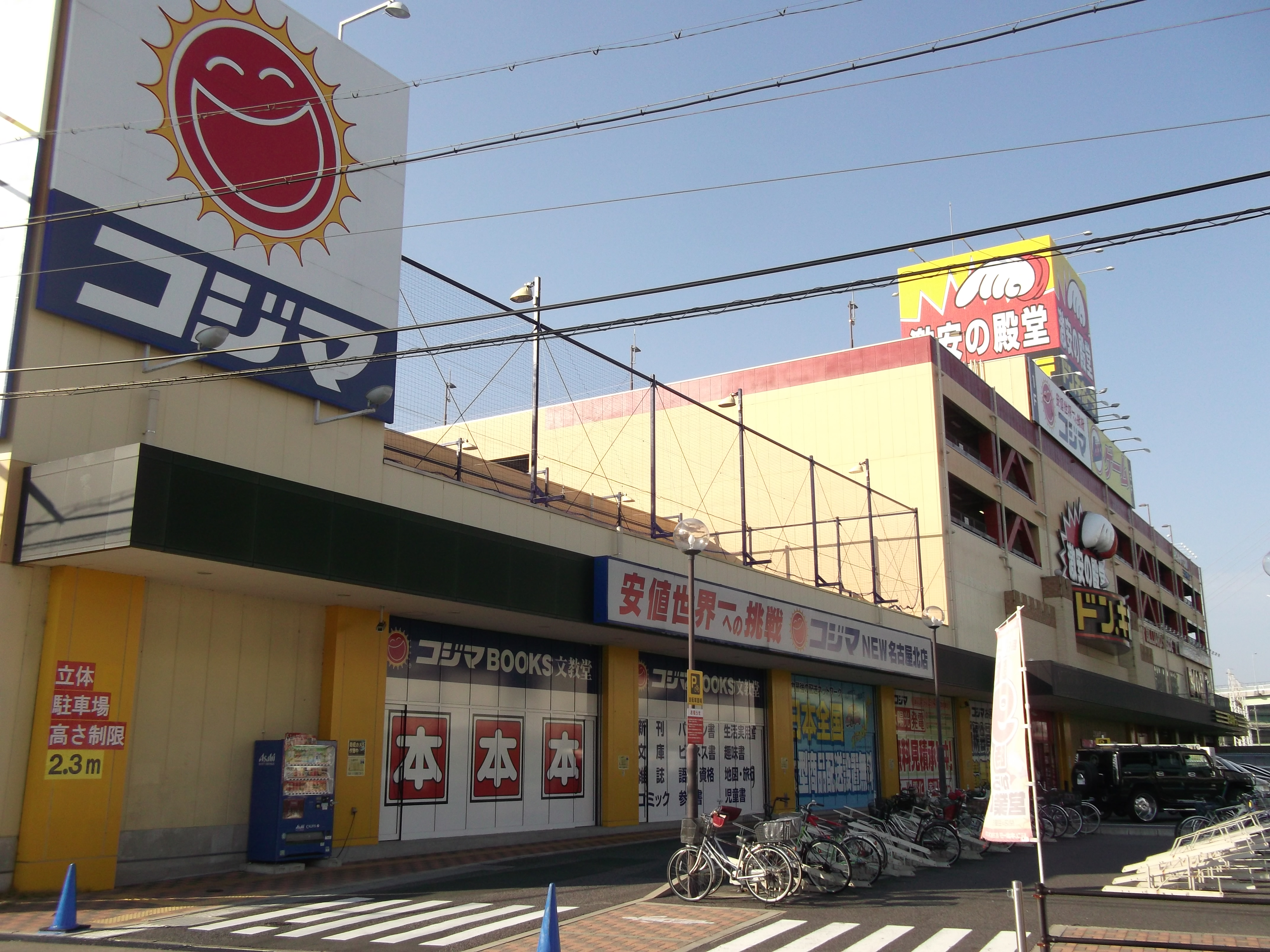 名古屋市北区玄馬町に所在するクロスタウン（名古屋北ショッピングセンター）を南側から写す